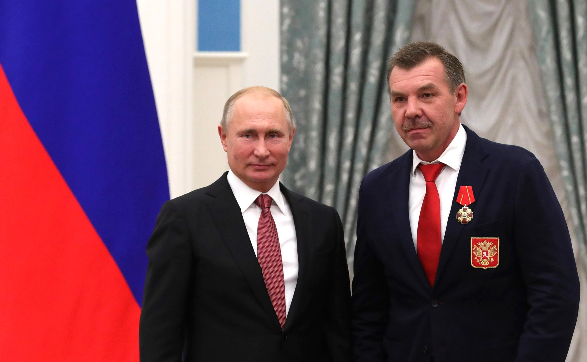 Вручение государственных наград. Орденом Александра Невского награждён консультант тренерского штаба национальной мужской сборной команды России по хоккею Олег Знарок.